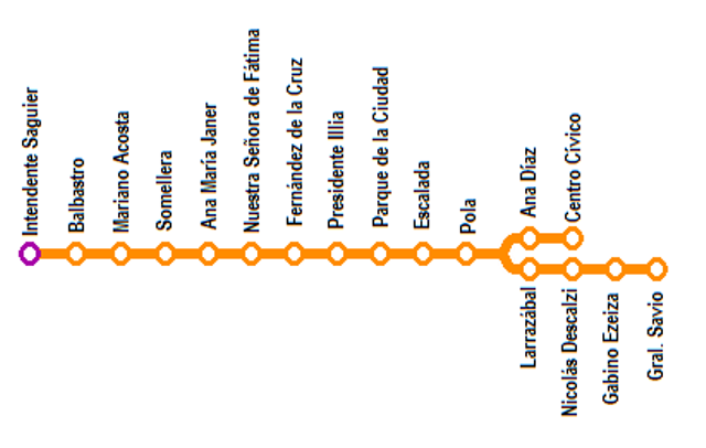 Rappresentazione Linea Premetro dellla Città di Buenos Aires